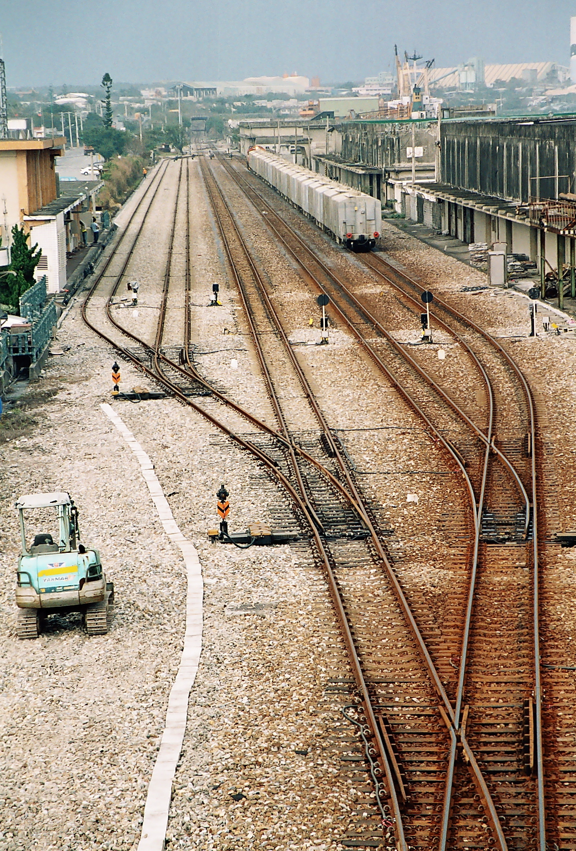 臺灣鐵路管理局花蓮港車站站內股道區。